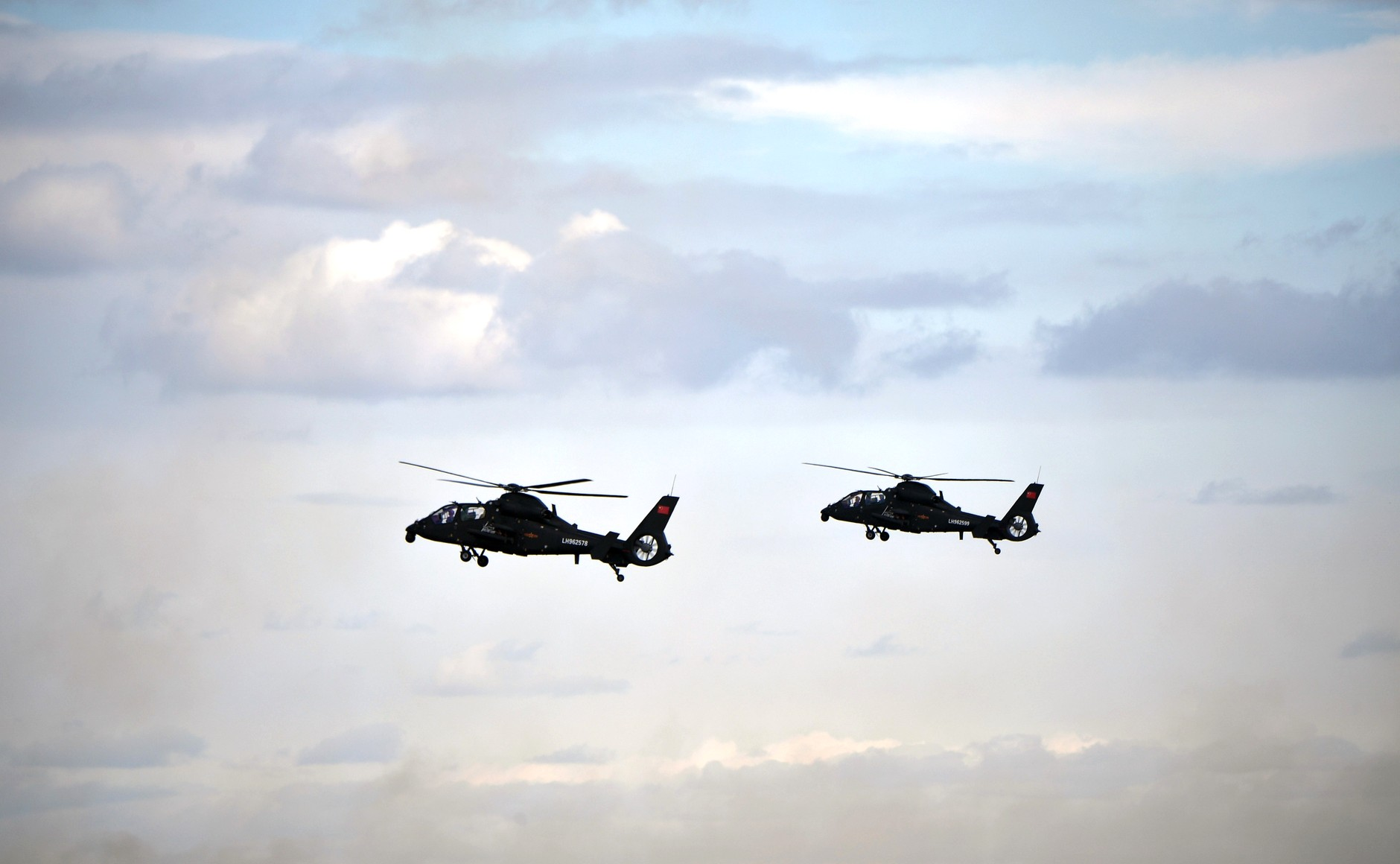 Основной этап манёвров «Восток-2018» на полигоне Цугол в Забайкальском крае.